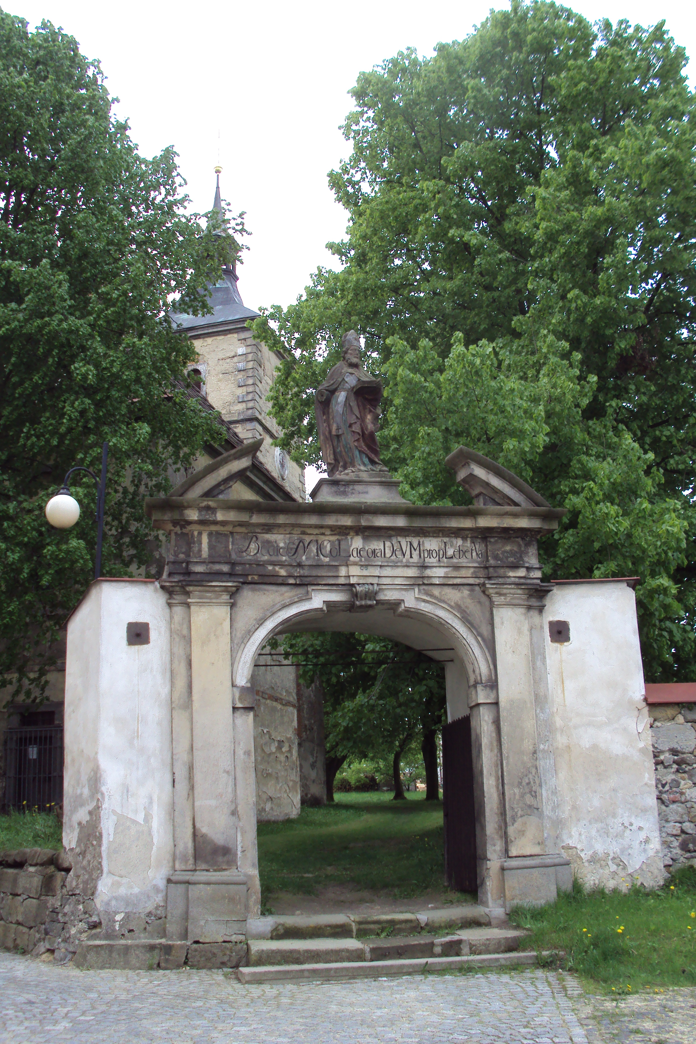 Brána do areálu kostela v Brništi